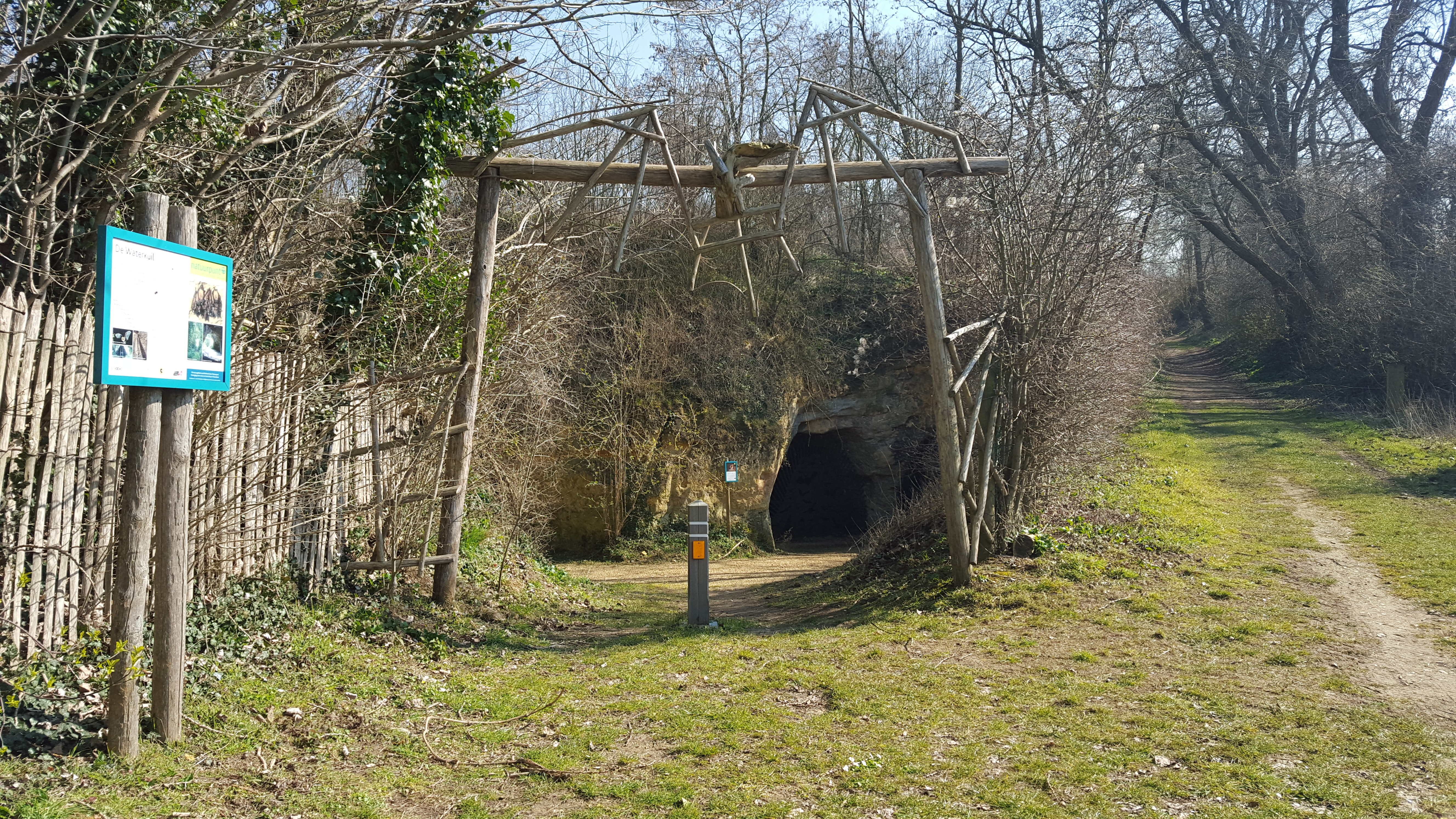 De Waterkuil, Groeve Henisdaal, Vechmaal, België